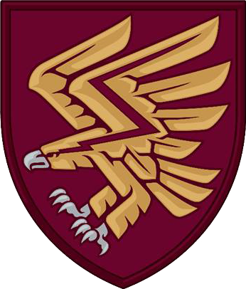 Нарукавний знак, 95 окрема десантно-штурмова бригада